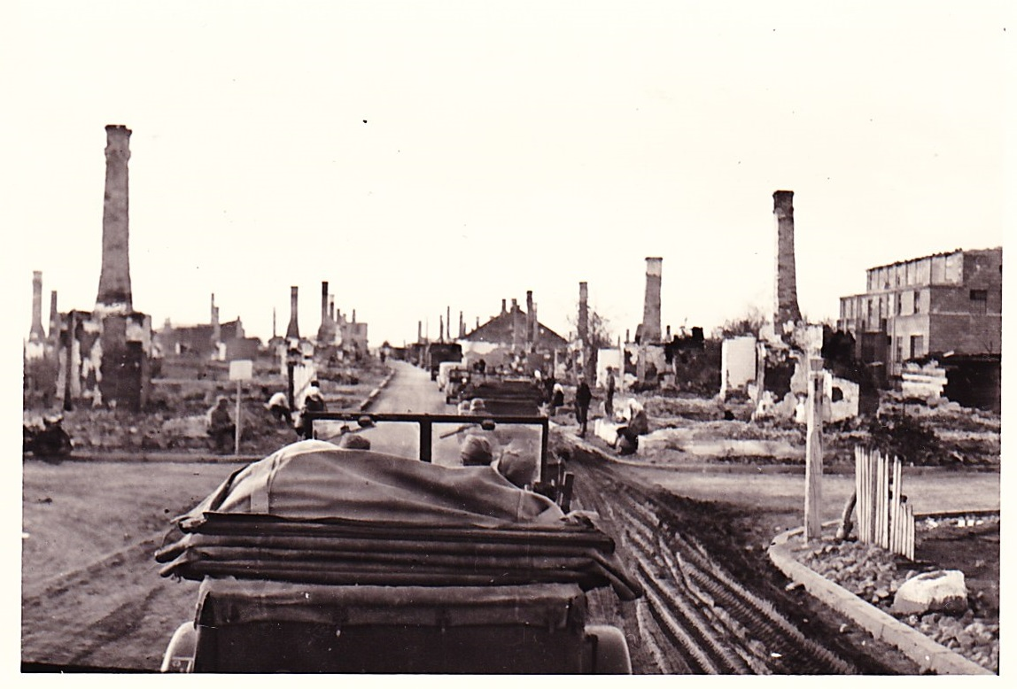 10 września 1939 roku wojska niemieckie wkroczyły do Wysokiego Mazowieckiego. Ta brzemienna w skutkach napaść pochłonęła wiele ofiar oraz pociągnęła za sobą zniszczenia. Drewniane zabudowania miasta zostały spalone, zabito żywy inwentarz. Szacuje się, że w trakcie ataku Niemców na miasto zniszczono ponad 80 % zabudowań. Ocalały jedynie kościół i cerkiew prawosławna oraz kilka domów w południowej części miasta. 27 września 1939 roku Armia Czerwona zajęła zniszczone miasto, w którym przebywała do 22 czerwca 1941 roku.